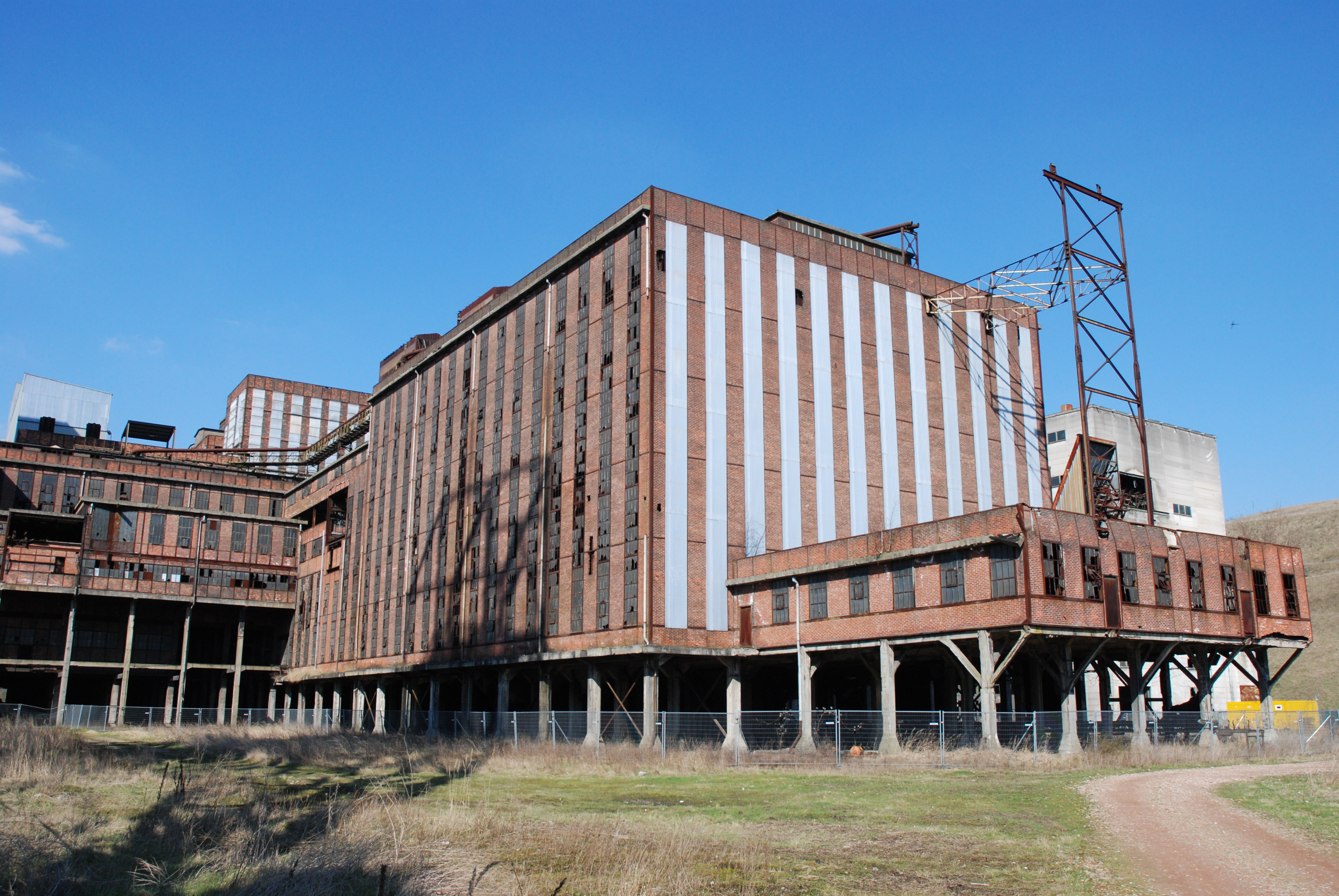 De kolenwasserij van de steenkoolmijn te Beringen, België